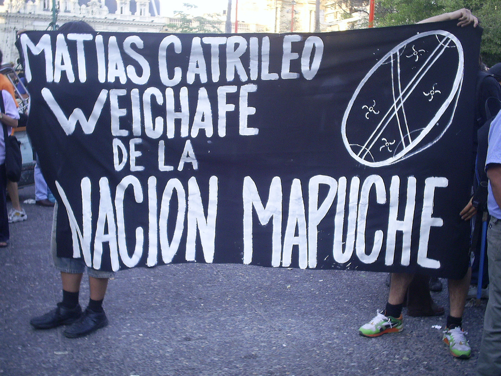 P.P. Mapuche